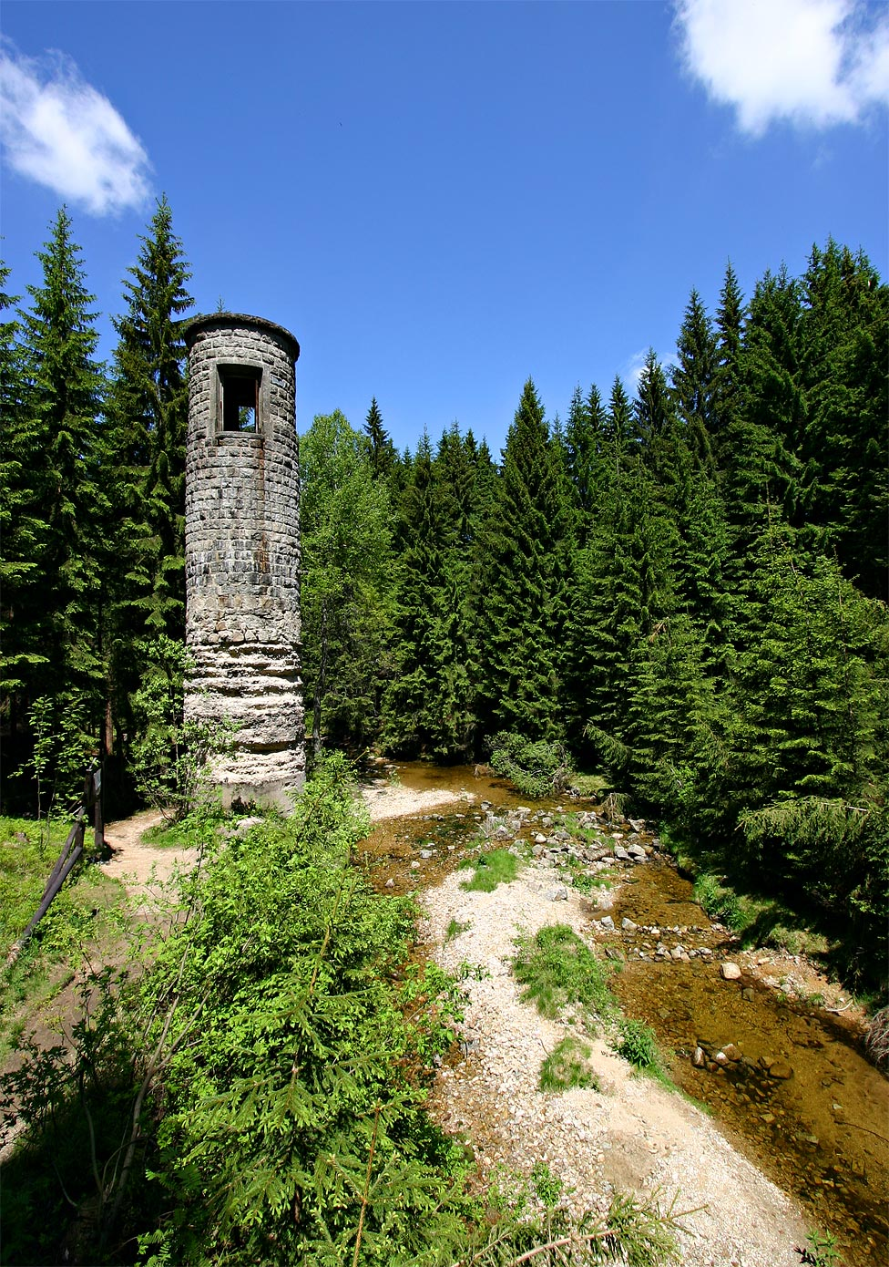 Šoupátková věž protržené přehrady na Desné. (vlastní fotografie)